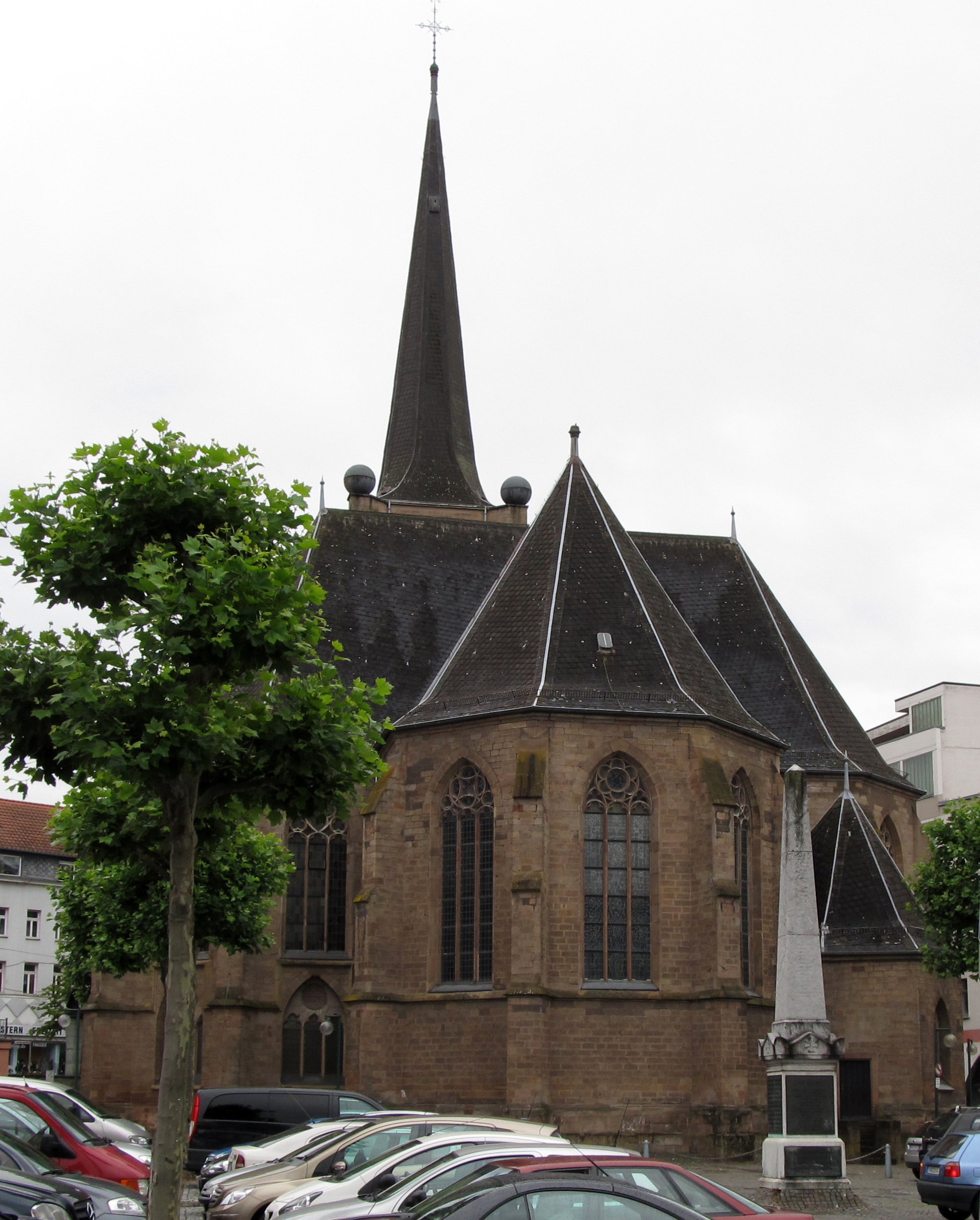 Die protestantische Christuskirche in Neunkirchen, Saarland